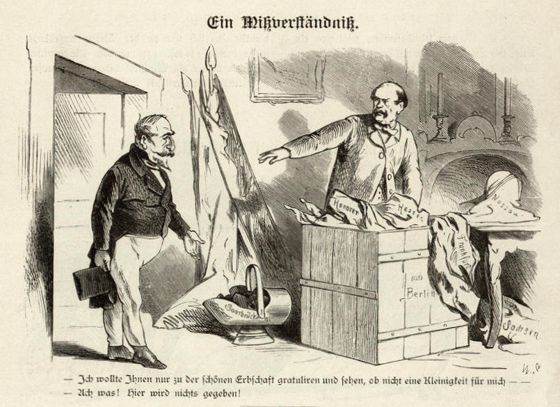 Bismarck-Album des Kladderadatsch. "Ein Missverständnis." Karikatur auf die Hoffnung Napoleons III., nach dem Deutschen Krieg Saarbrücken annektieren zu können. Bismarck, dessen Preußen Hannover und andere Staaten "ererbt" hat, lehnt dies ab.